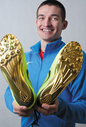 Илья Шкуренев. Призер чемпионата Европы по легкой атлетике, серебряный призер чемпионата мира среди юниоров-2010 в десятиборье, участник Олимпийских игр в Лондоне. Фотография из серии «Лица эстафеты».